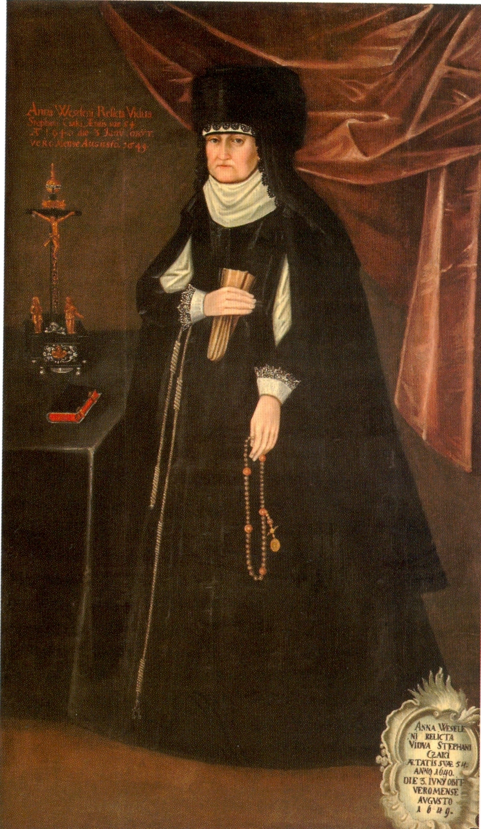 Körösszegi és adorjáni gróf Wesselényi Anna, Csáky Istvánné.